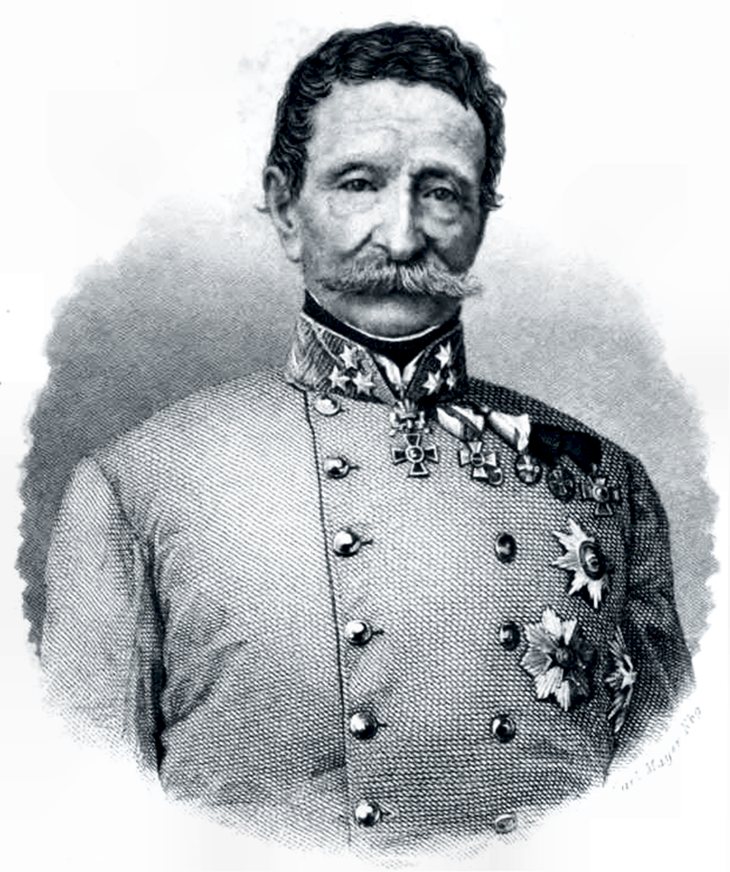 Feldzeugmeister Karl Freiherr von Culot 1860